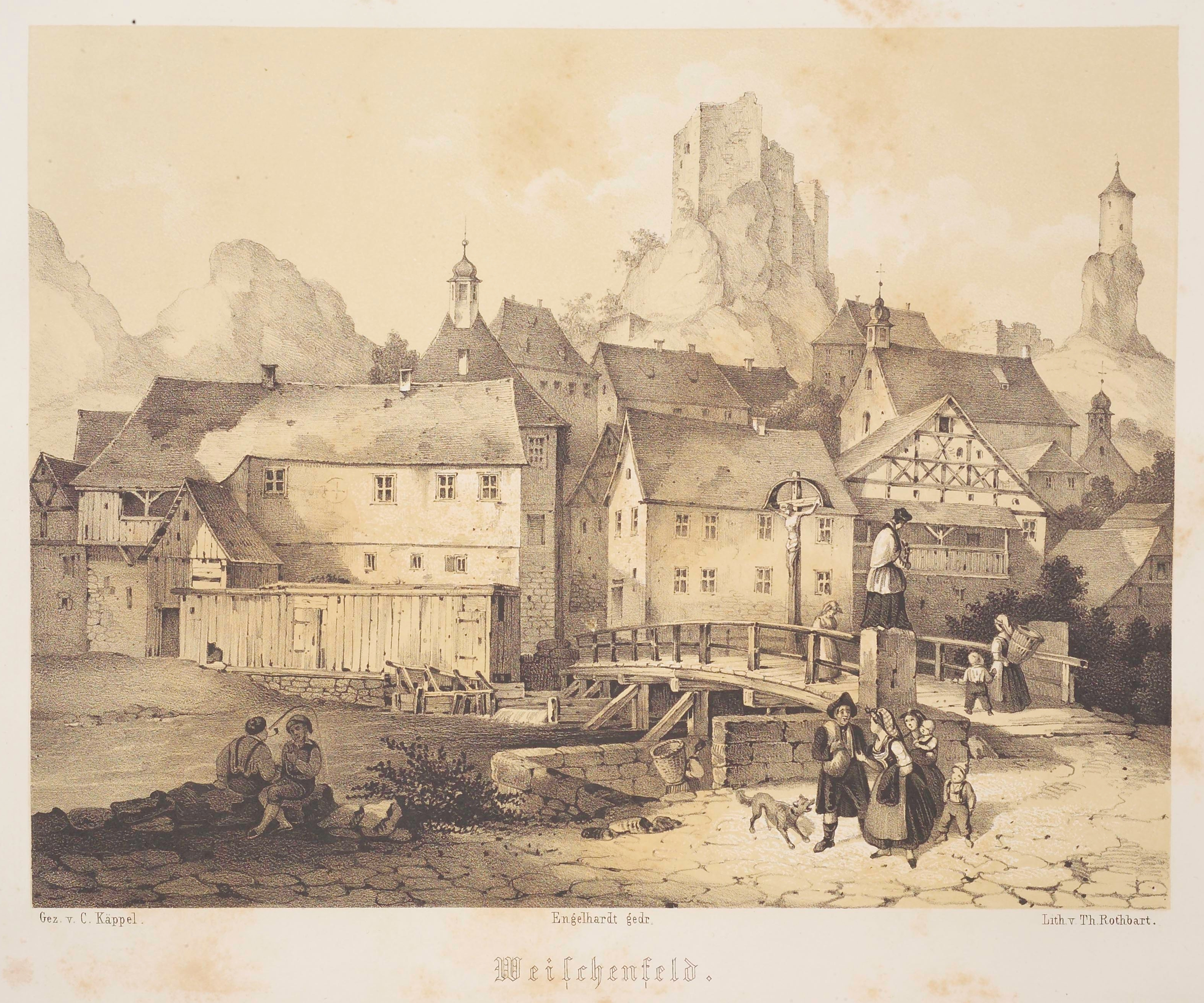 Waischenfeld in Fränkische Schweiz. Cyclus der der interessantesten Punkte aus der Umgegend von Muggendorf und Streitberg. Sechzehn in Ton gedruckte Lithographien. Nach Originalzeichnungen von C. Kaeppel lithographirt von Th. Rothbarth.